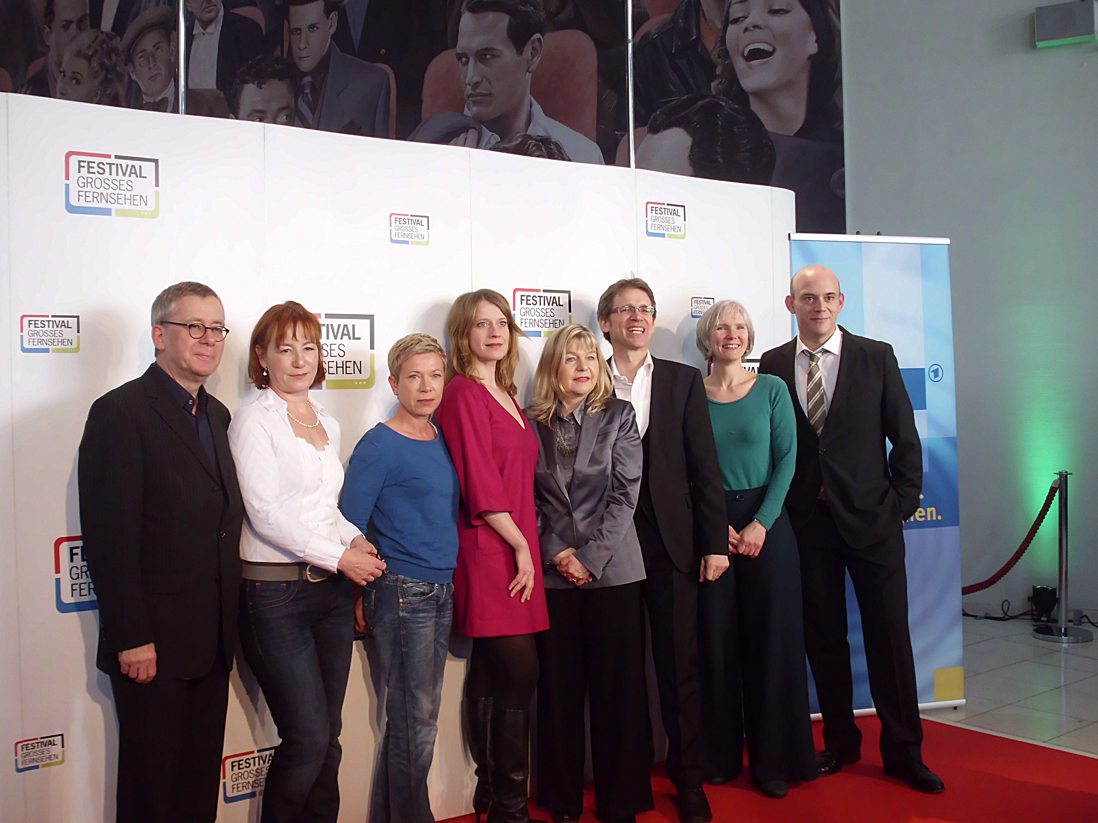 Festival Großes Fernsehen, Köln, Cindeom, 2.03.2013, u.a. mit WDR-Fernsehfilmchef Gebhard Henke, Ulrike Krumbiegel, Caroline Peters